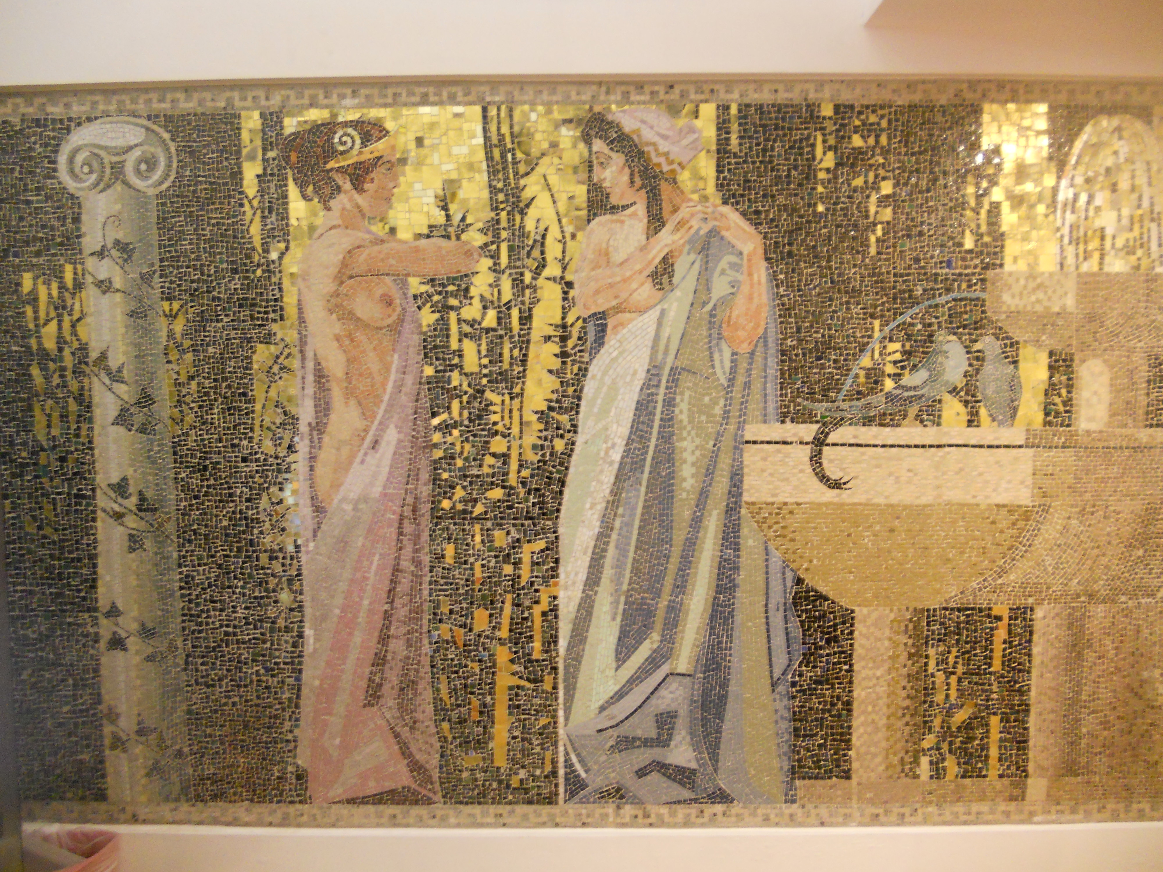 Ausstattung Dianabad (Glasmosaike, Majolikaplastik)